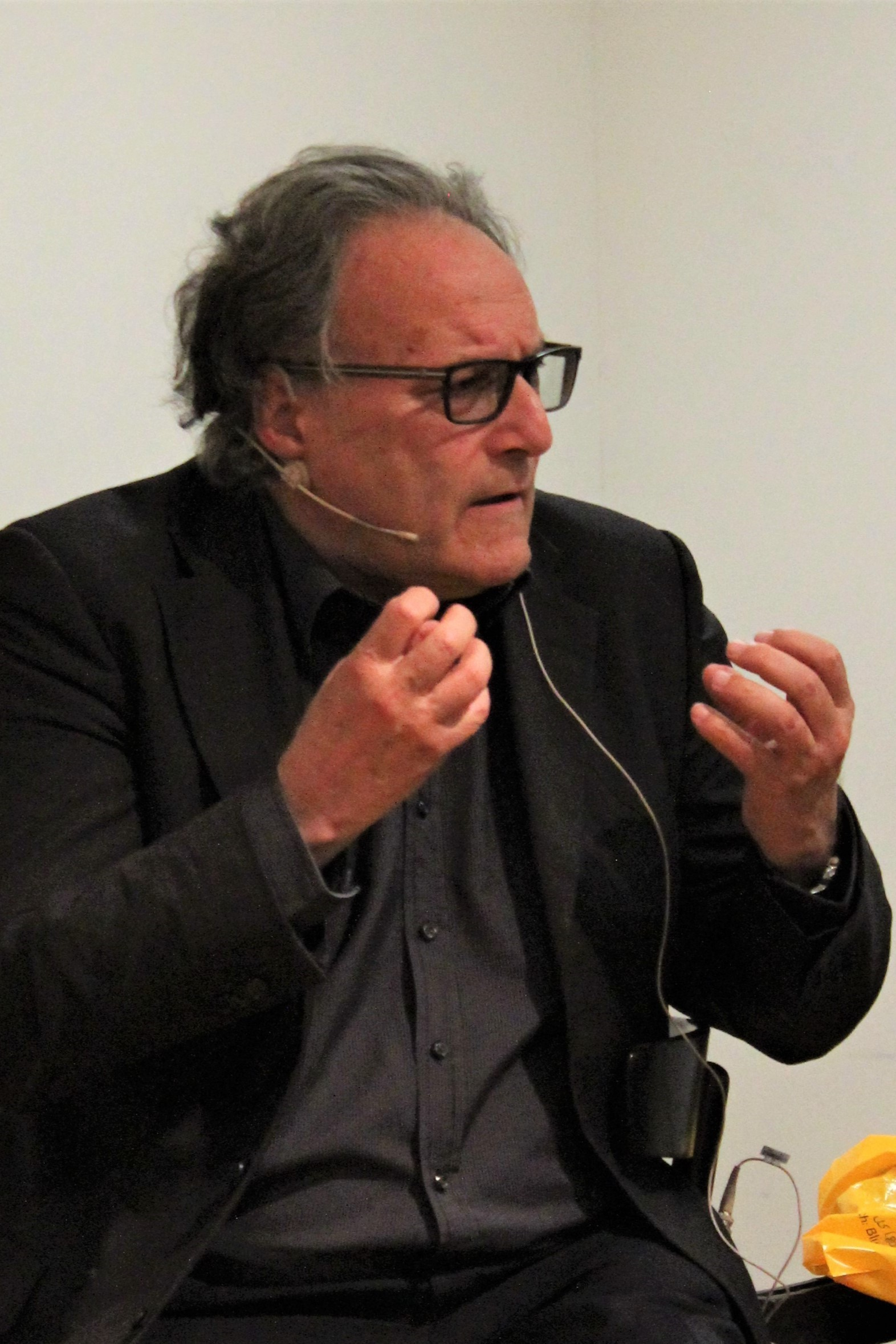 Der Schweizer Autor Pirmin Meier an einer Veranstaltung in Einsiedeln (2017)